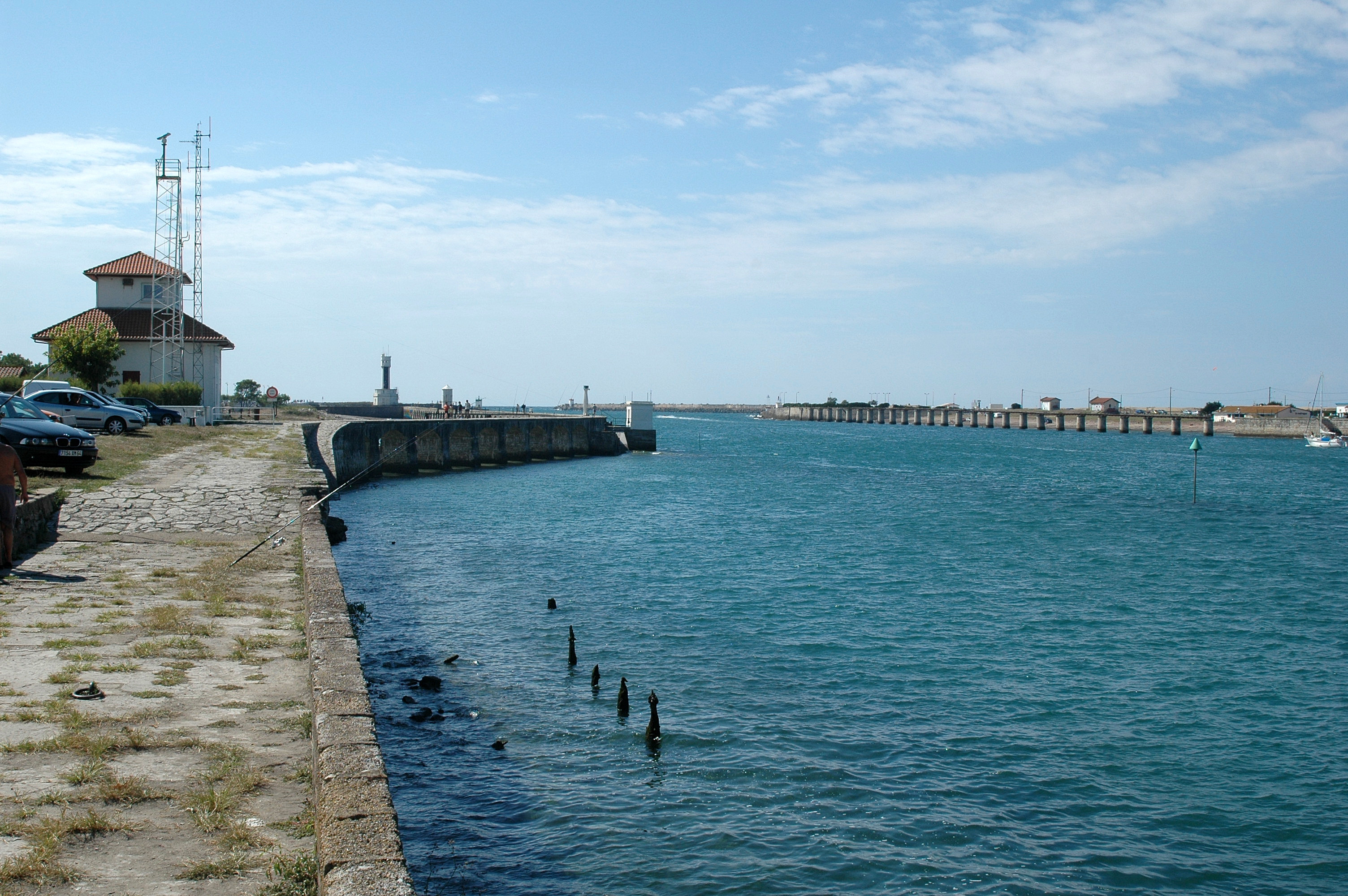 Bayonne, l'embouchure de l'Adour. Photo prise le 19/08/06 par Harrieta171